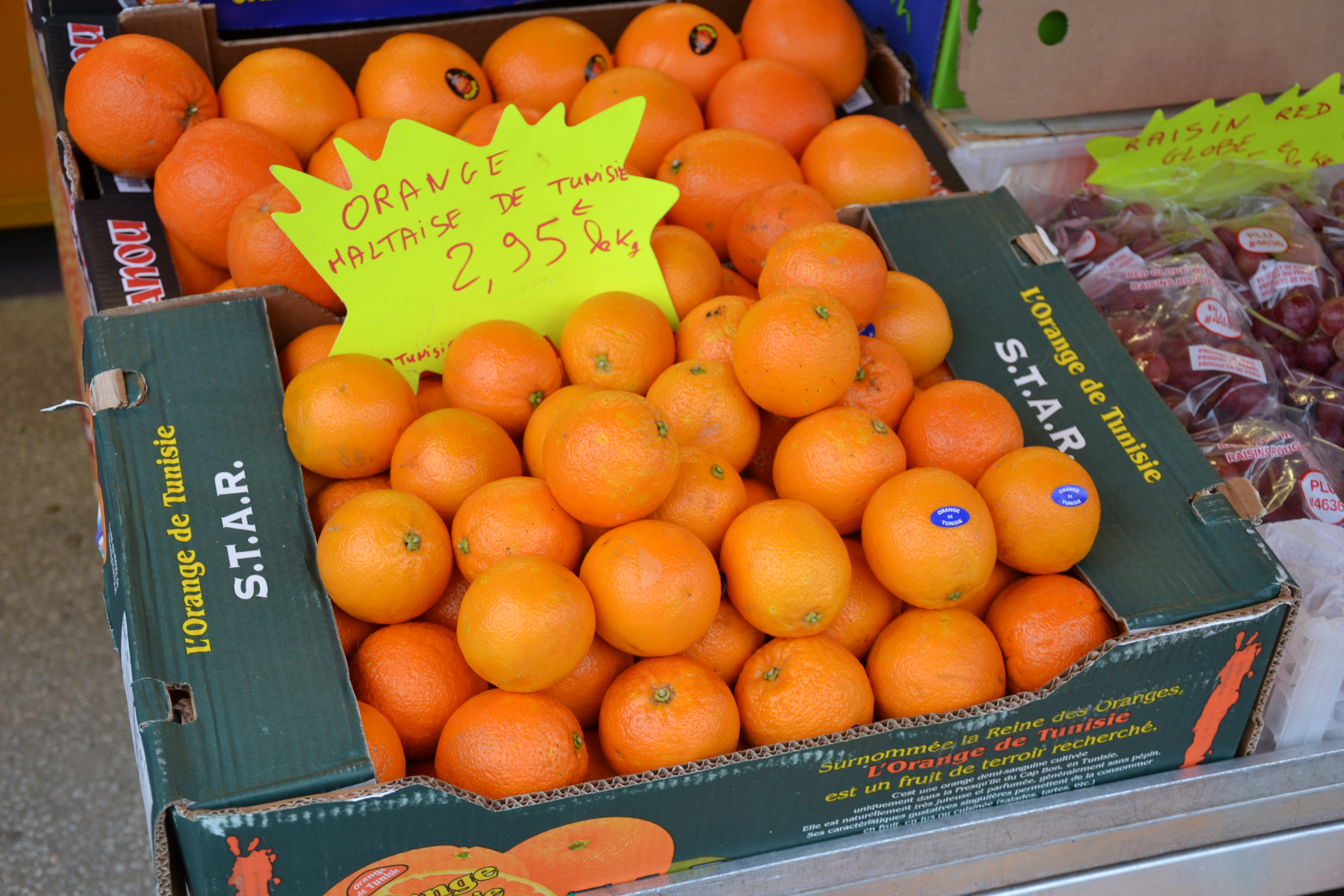 Oranges maltaises de Tunisie sur un marché en France (janvier 2016)